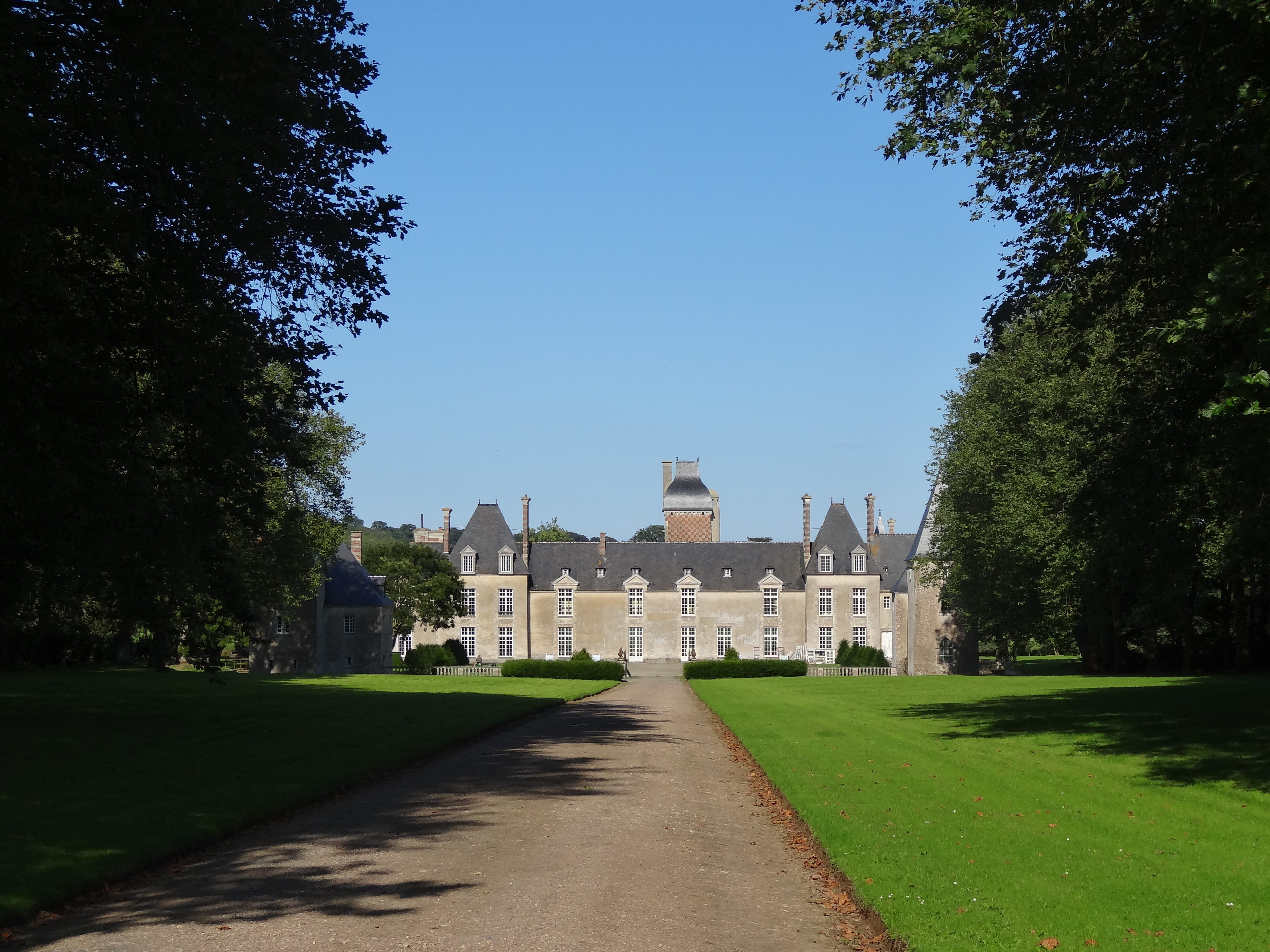 Maisons (Calvados) château datant en grande partie du XVIIe siècle